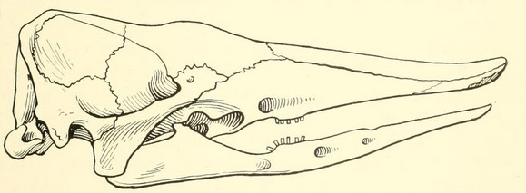 Skull of Stegotherium